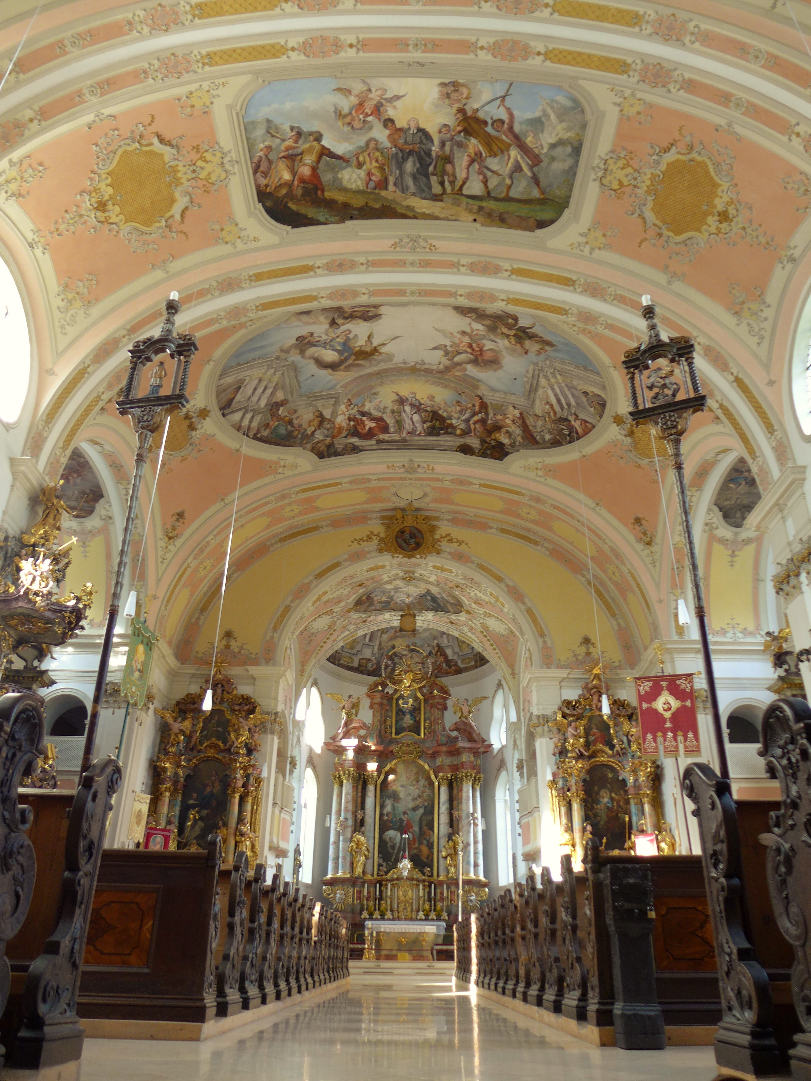 St. Martin (Garmisch-Partenkirchen), Kirchenschiff mit Blick zur Apsis